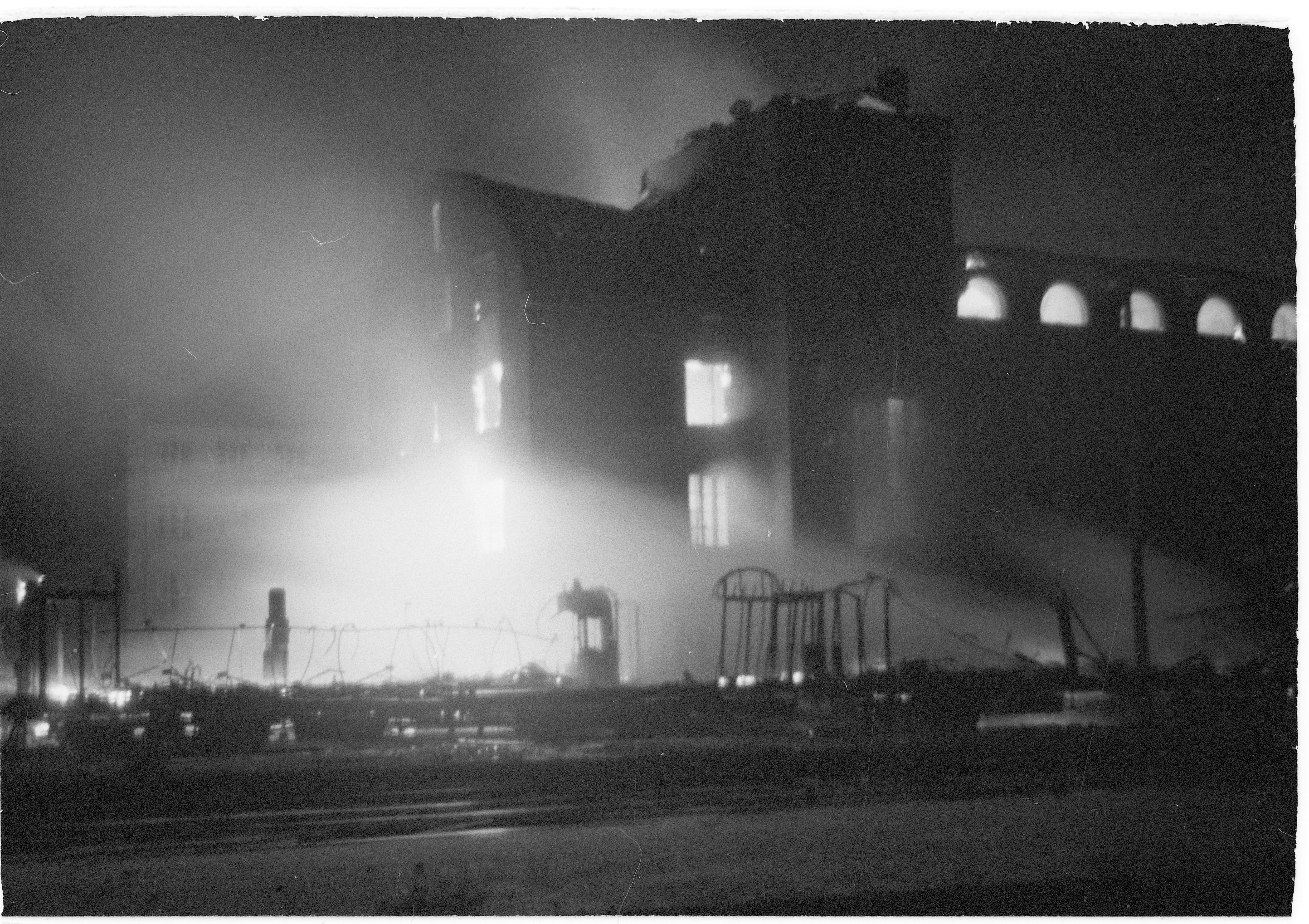 Helsingin rautatieasema tulessa pommitusten jälkeen.